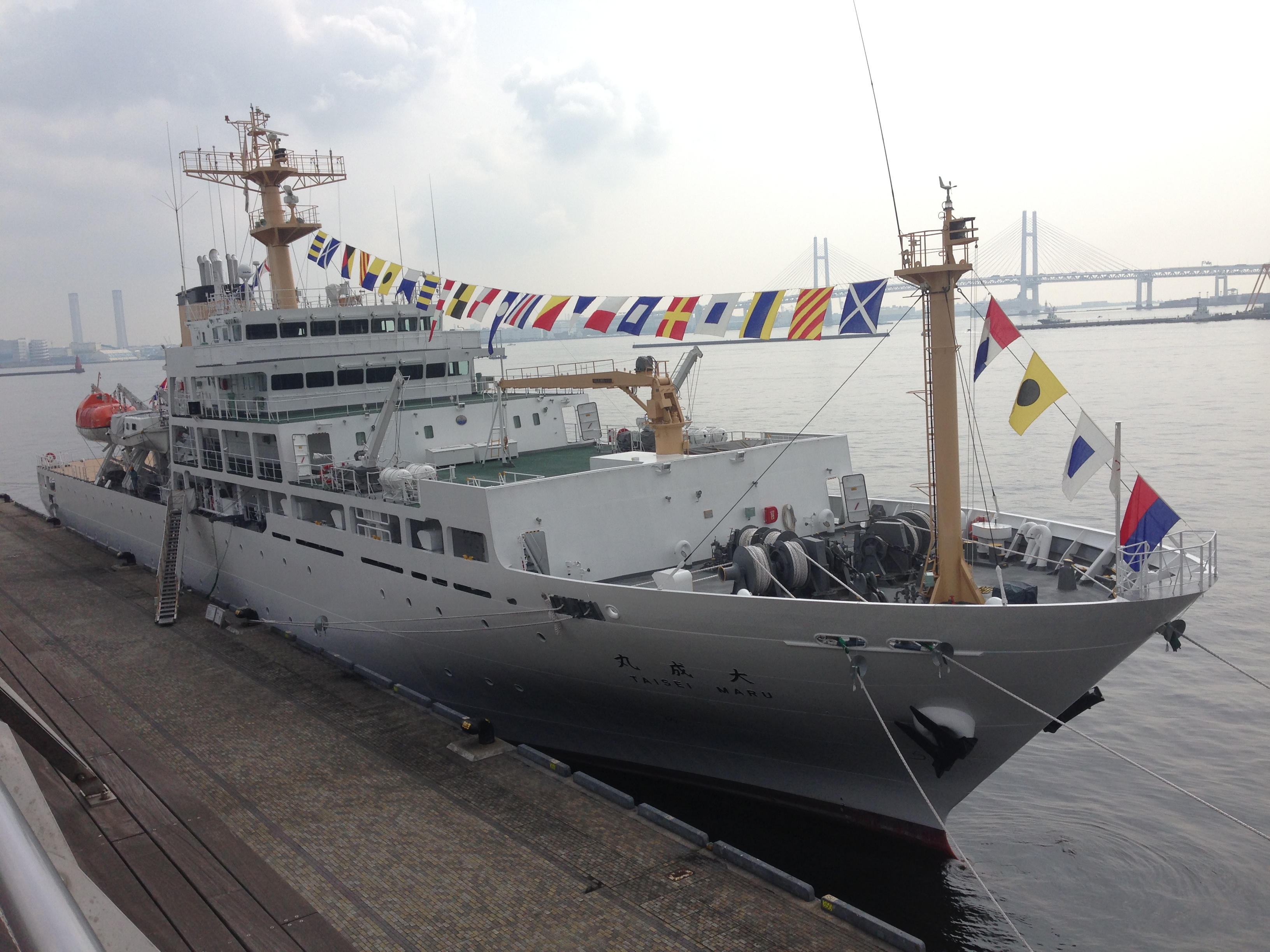 大桟橋停泊中の大成丸